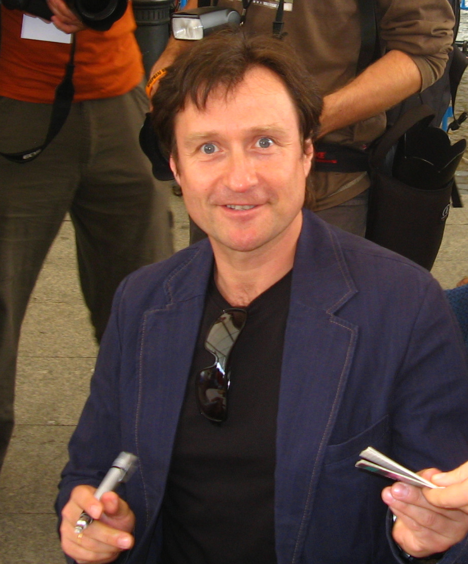 Jacek Kawalec - polski aktor II Międzynarodowy Festiwal Zawodów Filmowych CINEMAGIC w Płocku (22-24 czerwca 2007 r.)